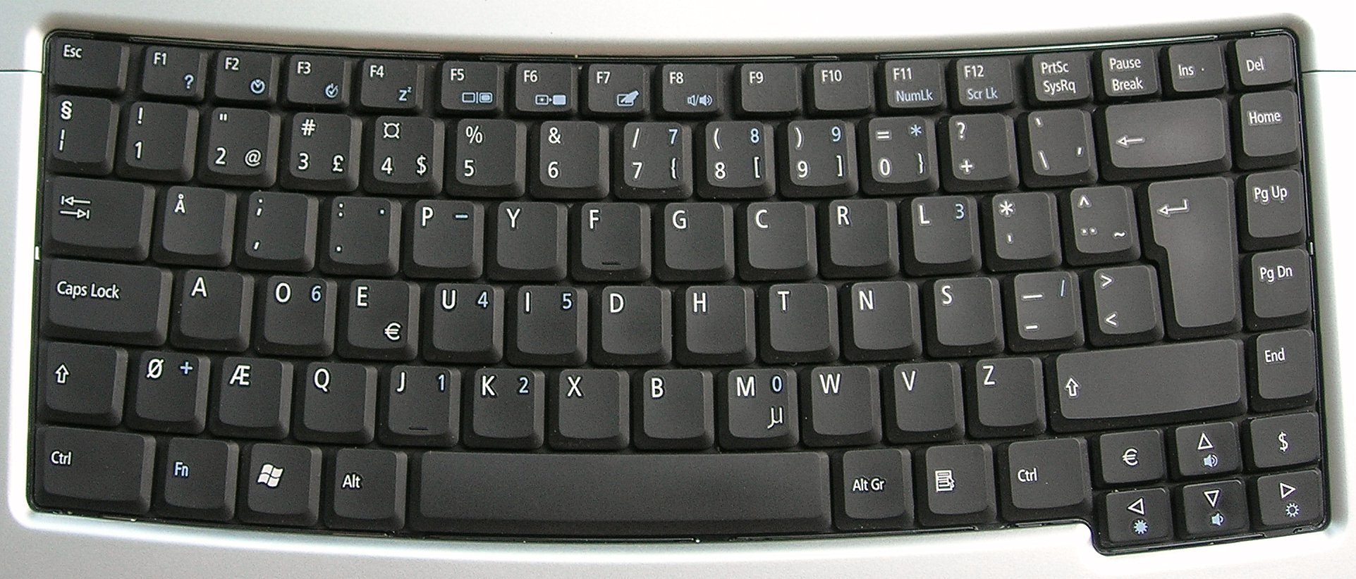 A Norwegian Dvorak keyboard layout